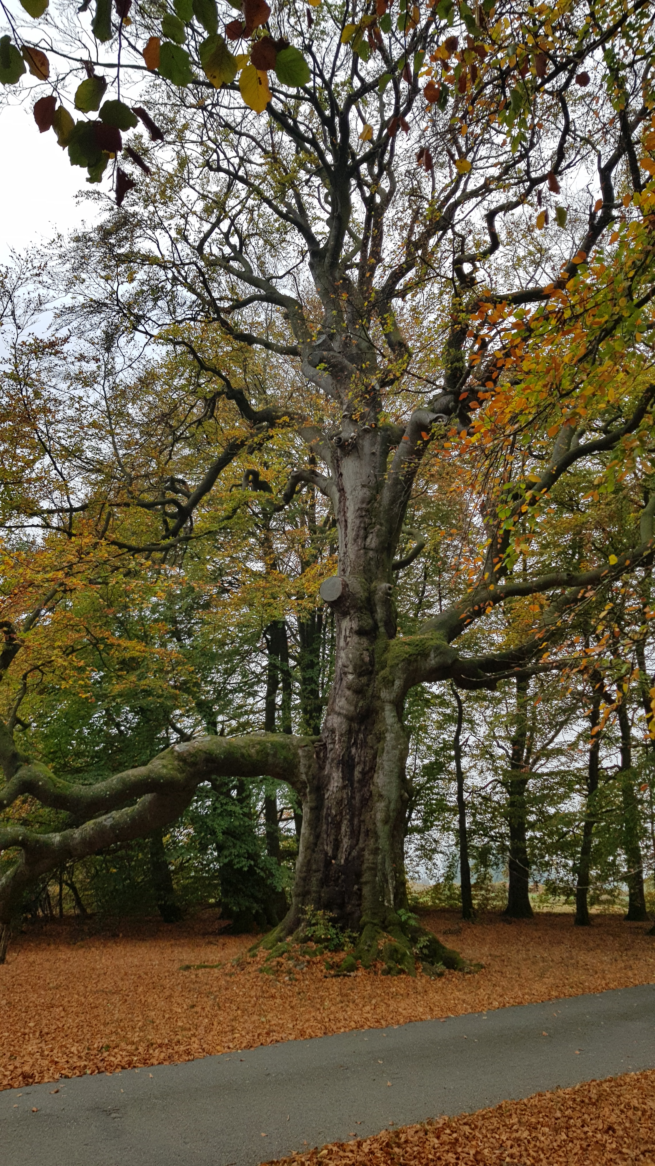 Rodter Buchen, Rodt, Sankt Vith, Belgien This photo of immovable heritage has been taken in the Walloon Region